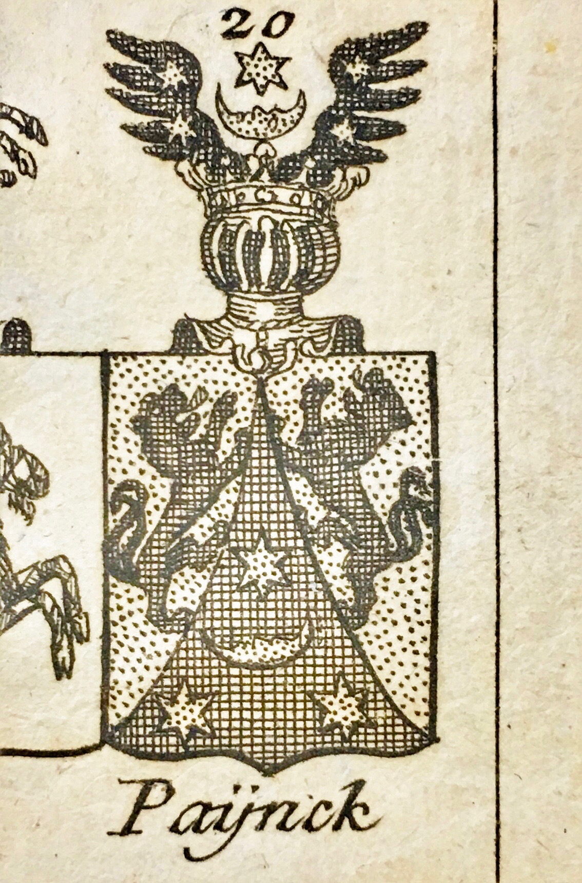 Kemiker og læge Peter Payngks våbenskjold. Fra: Lexicon over adelige Familier i Danmark, Norge og Hertugdommene, 1782-1814